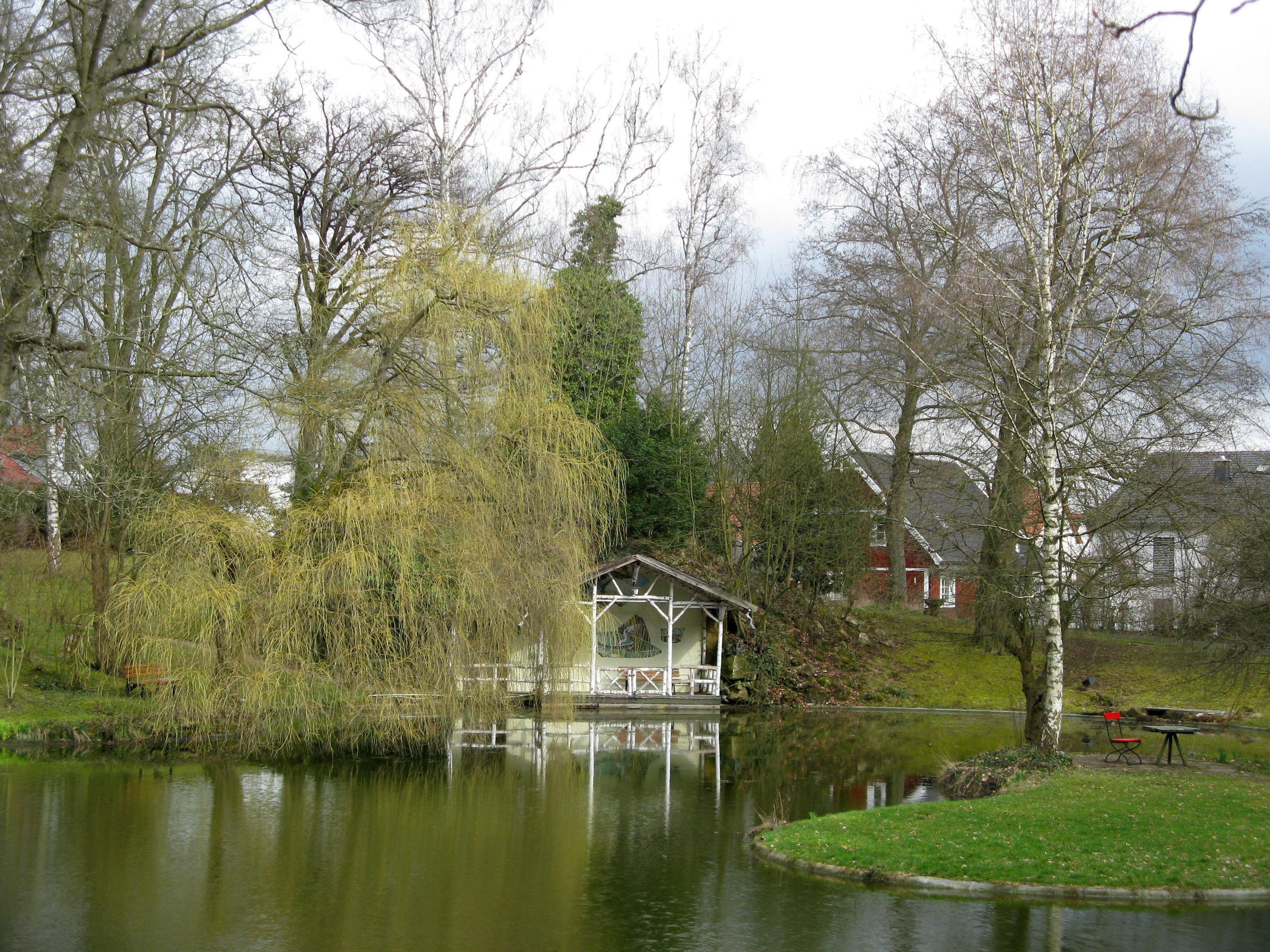 See im Gailschen Park Rodheim-Biebertal